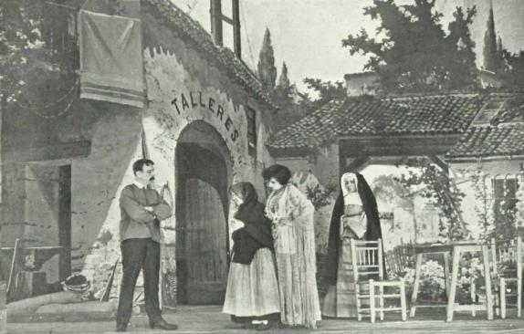 Escena del estreno de la obra de teatro Malvaloca, de los Hermanos Álvarez Quintero